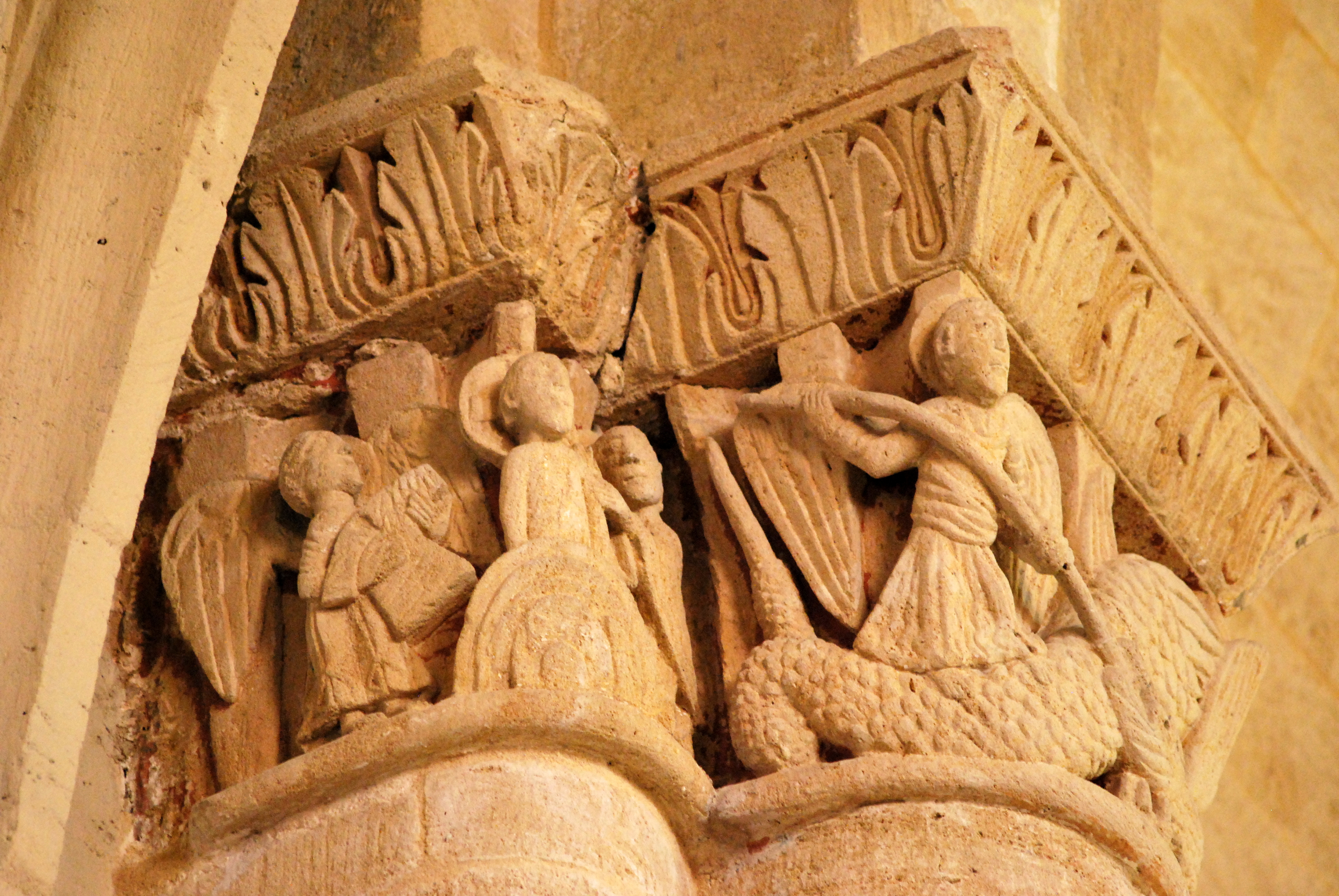 Église Saint-Quentin de Baron (Gironde)